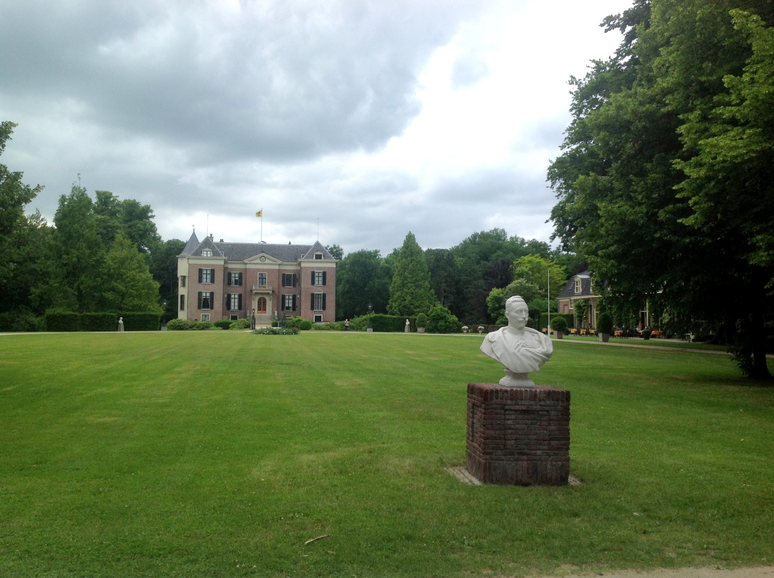 Huis Doorn, locatie van een "editathon" (schrijfmiddag) van Wikimedia Nederland.